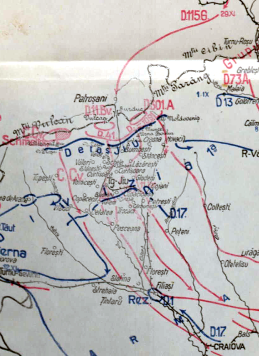 Actiunile militare din a doua bătălie din Valea Jiului - 1916